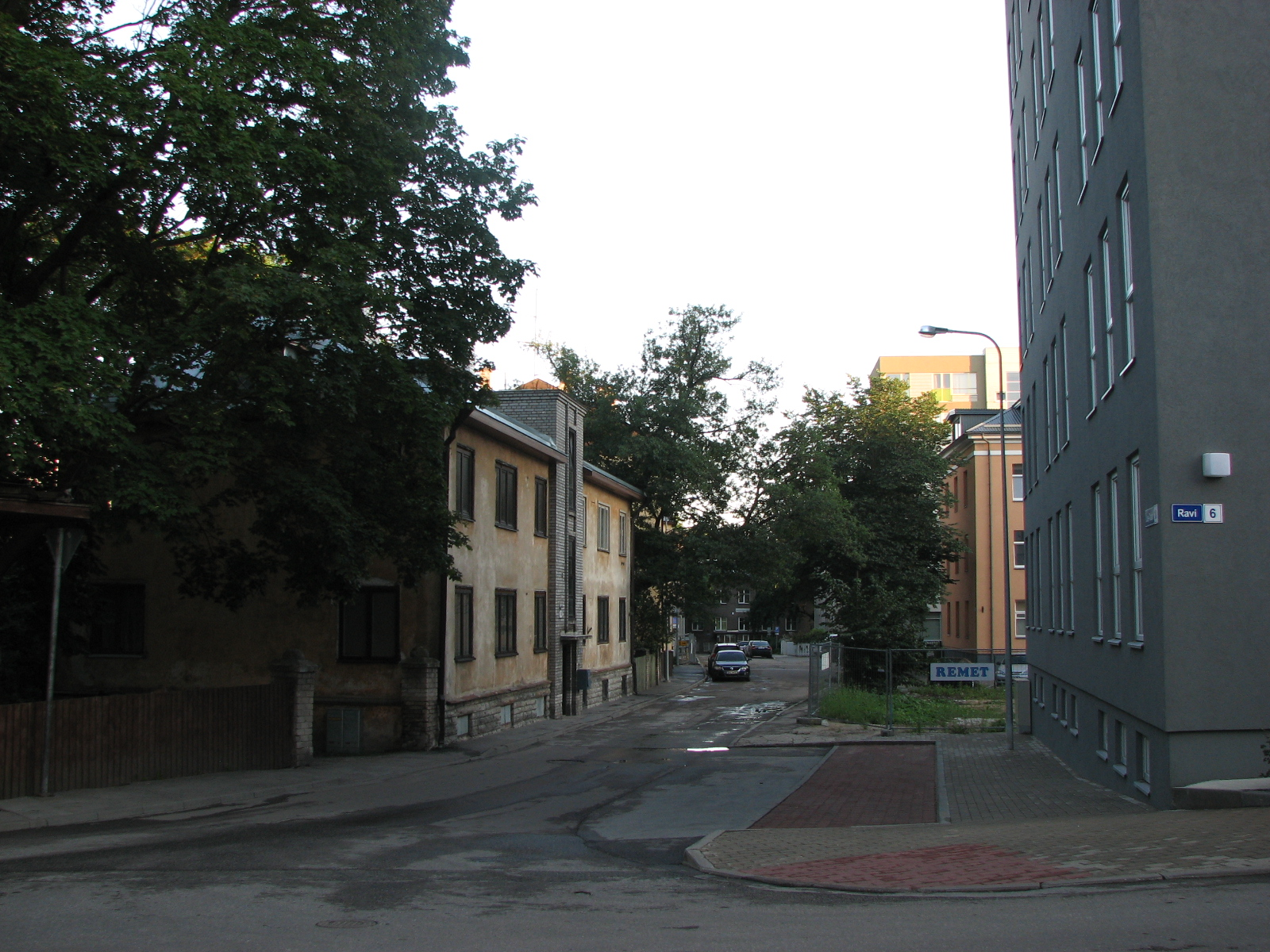 Vaade Uus-Tatari tänavale Ravi tänavalt